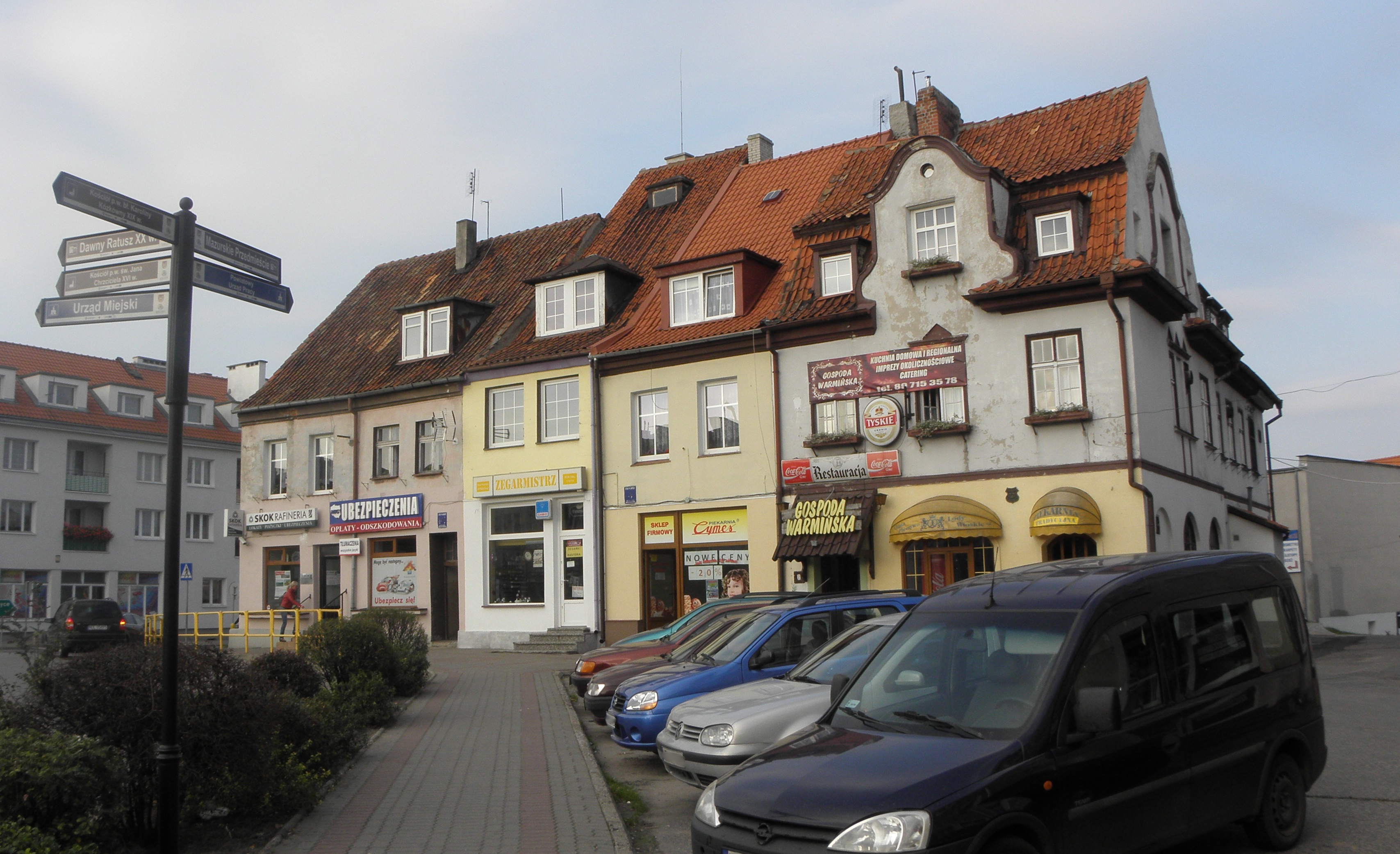 Kamieniczki. Gmina Biskupiec, powiat olsztyński.